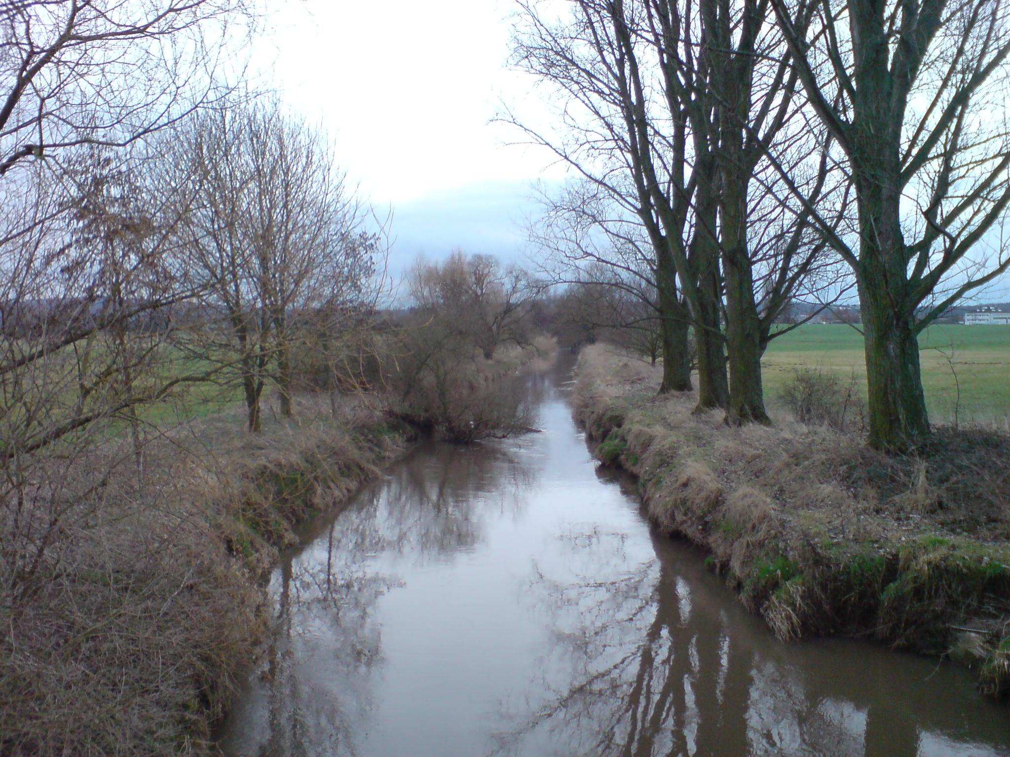 Nidder river between Altenstadt and Waldsiedlung